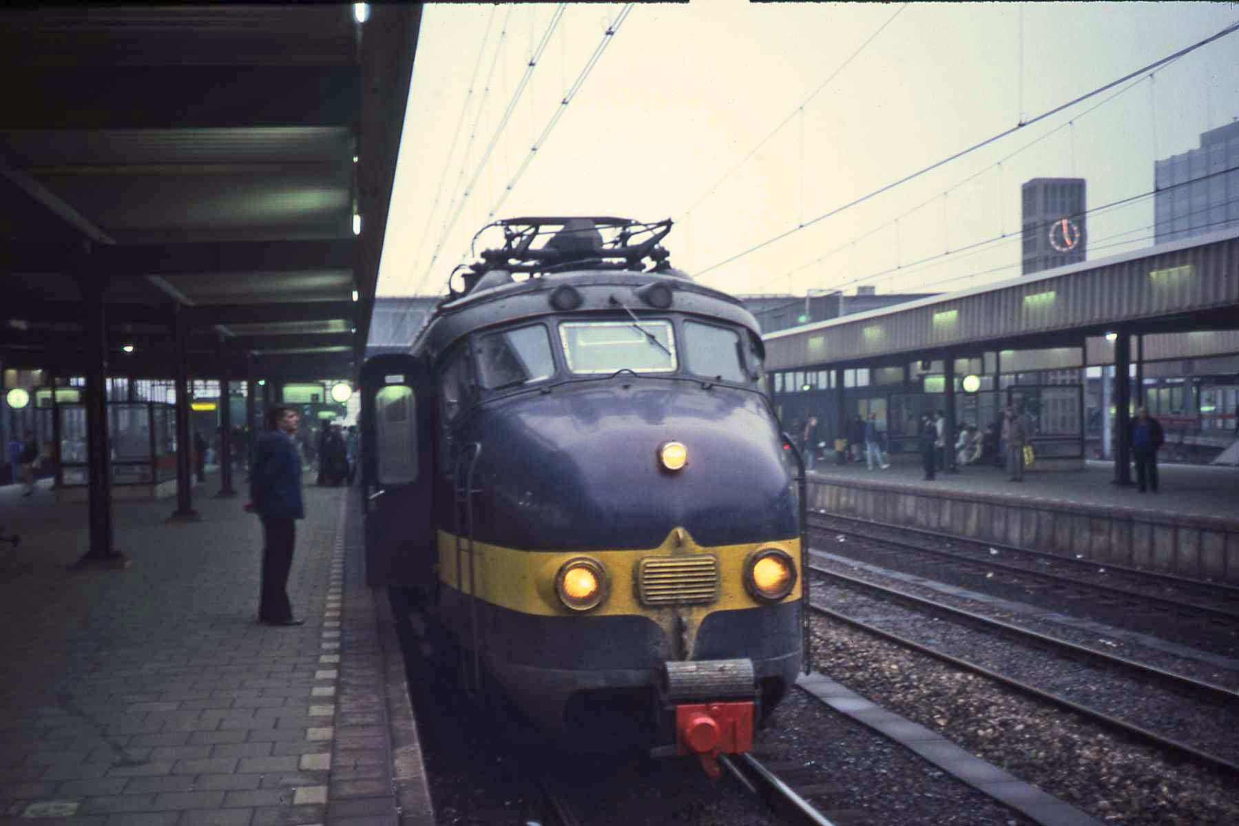 Beneluxtreinstel stop in Leiden. Niets is meer hetzelfde: De Beneluxtrein stopt hier niet meer, deze treinstellen zijn gesloopt en het station is herbouwd. Nu zijn twee doorgaande sporen ipv een.